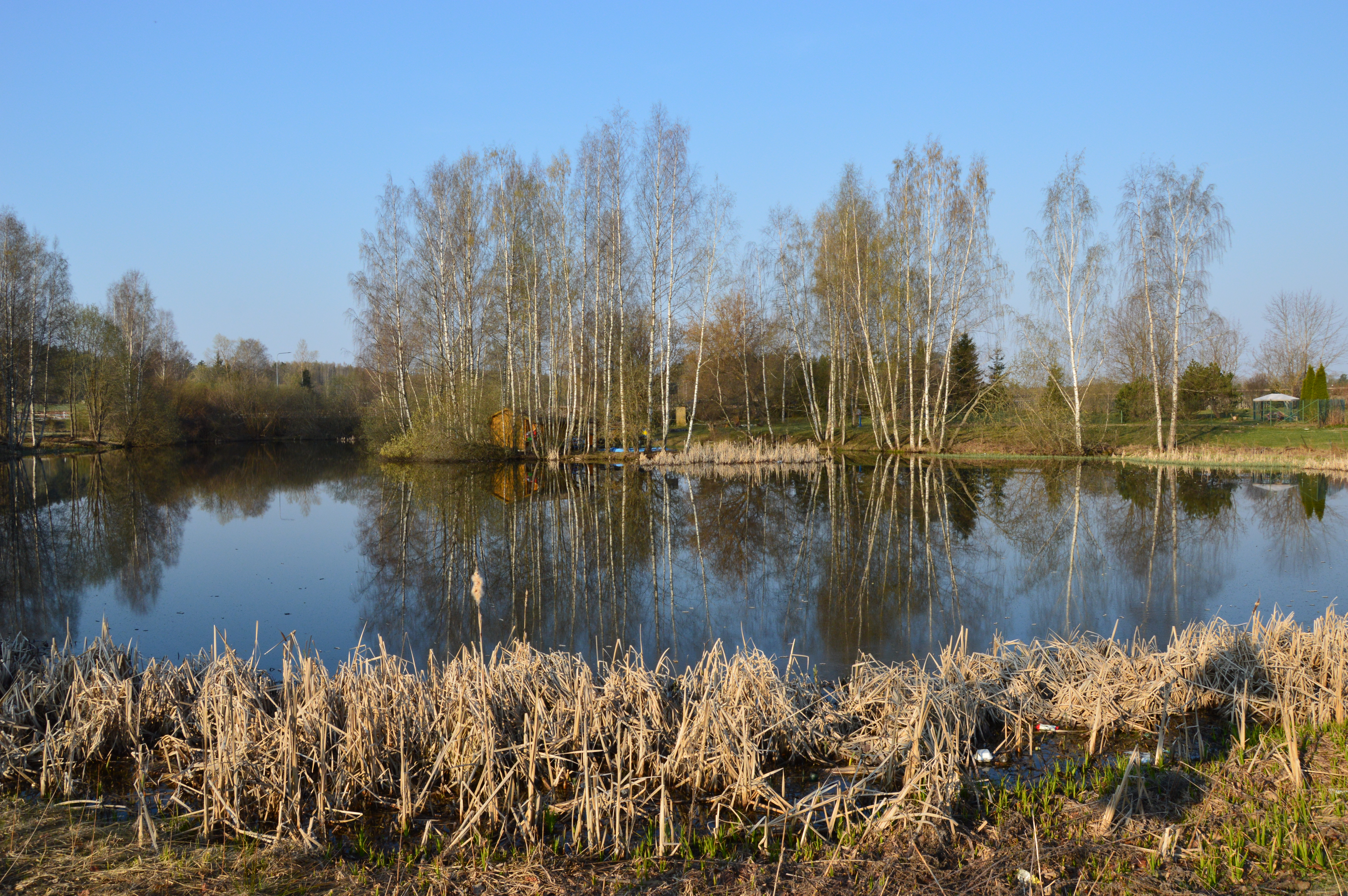 Kambja paisjärv ehk Järveots